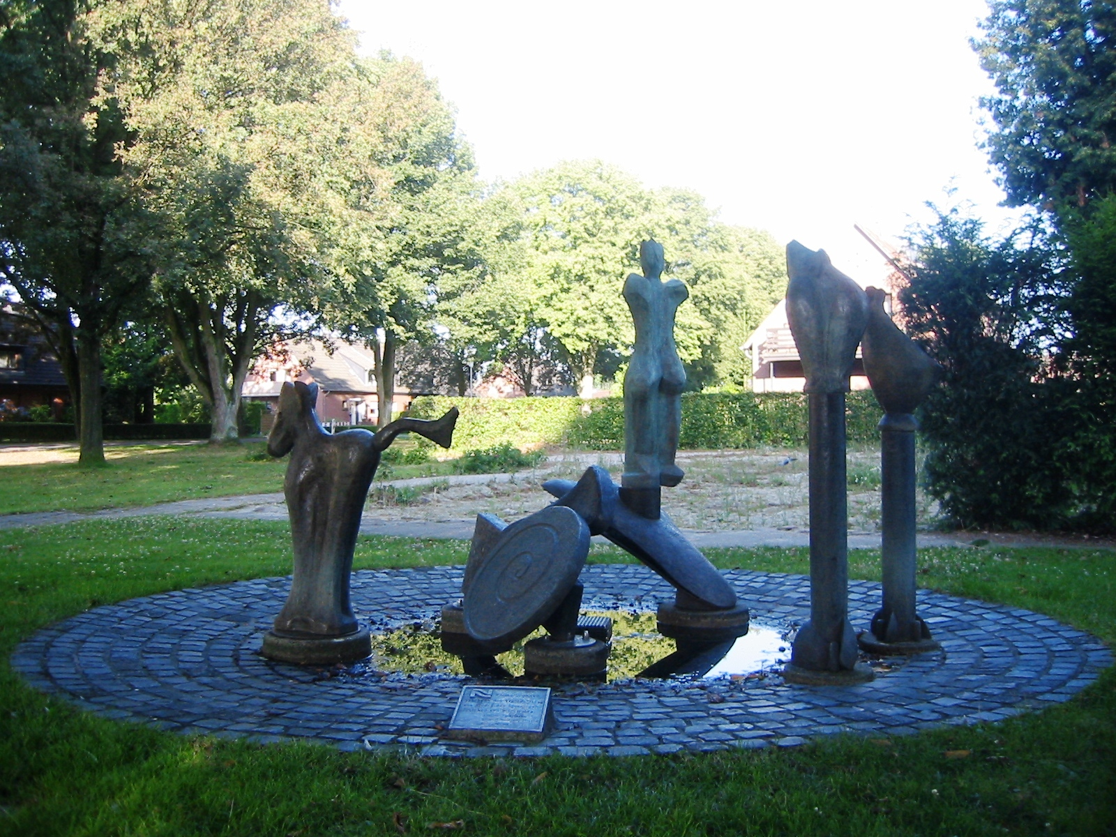 Heimatbrunnen neben dem Dorfplatz in Goch-Nierswalde (Deutschland)